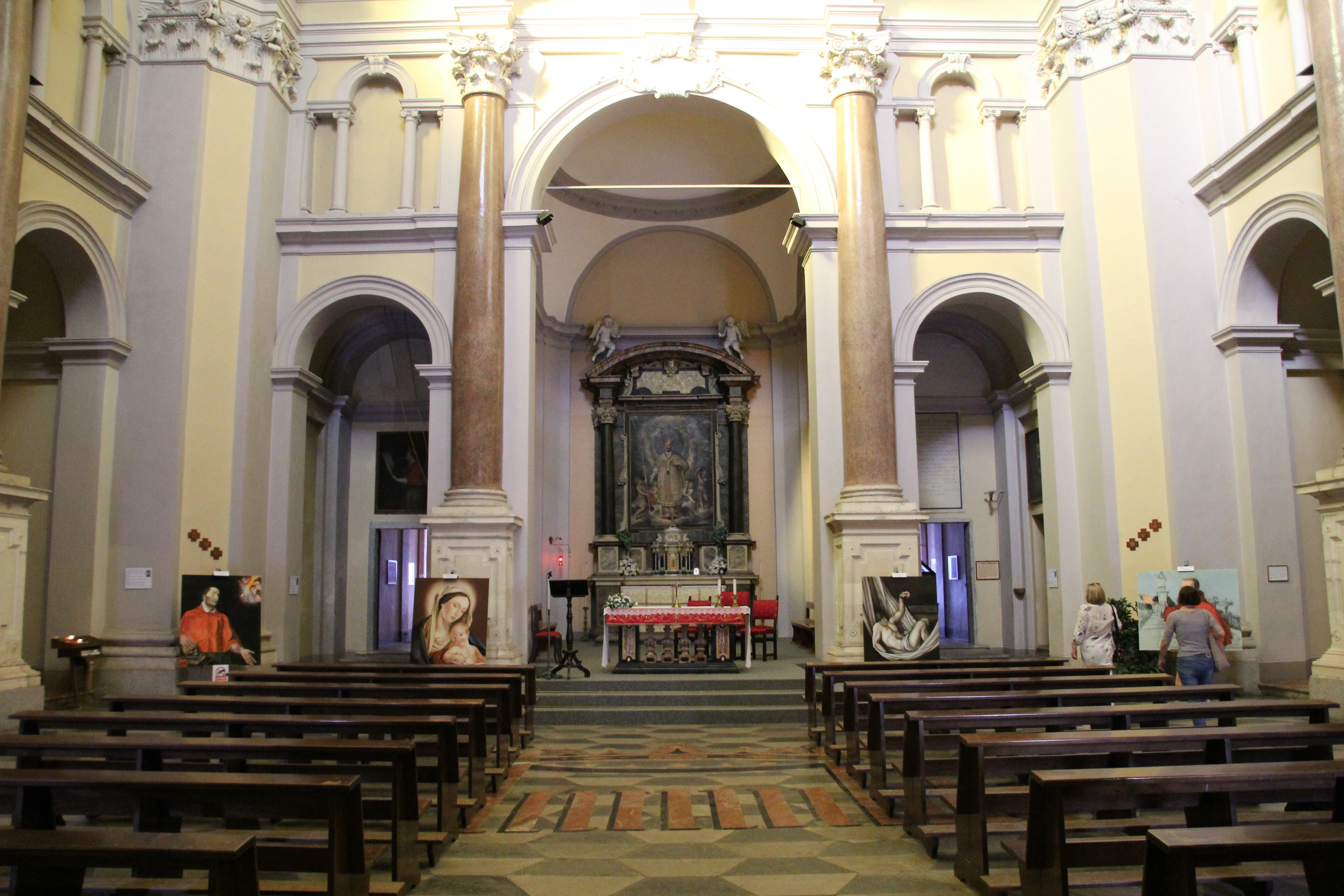 Arona, chiesa di San Carlo